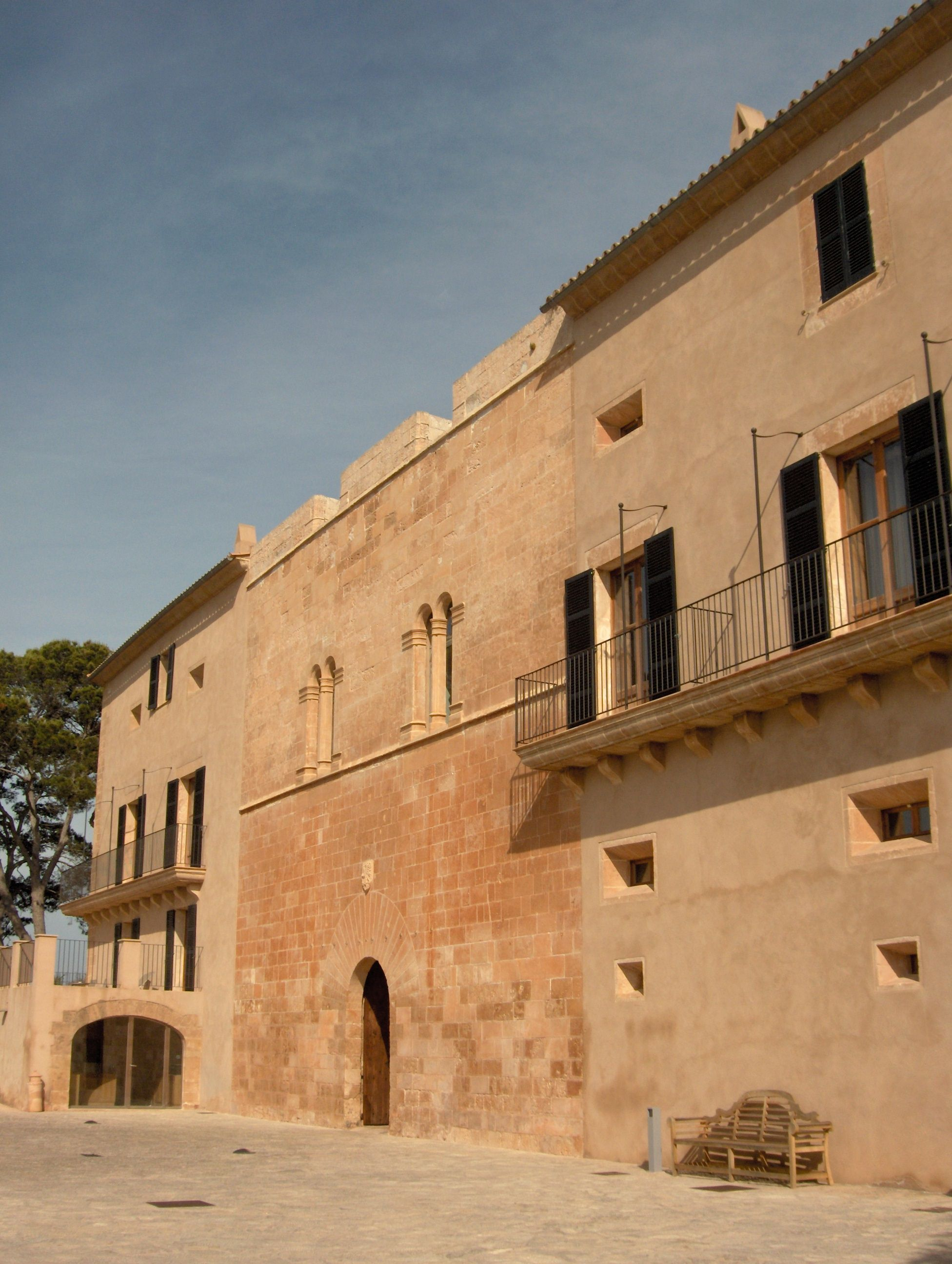 Façana principal de les cases de la possessió de Sa Torre, a la marina de Llucmajor, Mallorca.